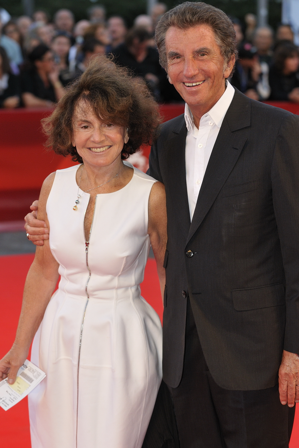 66ème Festival du Cinéma de Venise (Mostra), 4ème jour (05/09/2009) Tapis Rouge avec Jack Lang et sa femme Monique Buczynski pour le film : Persécution